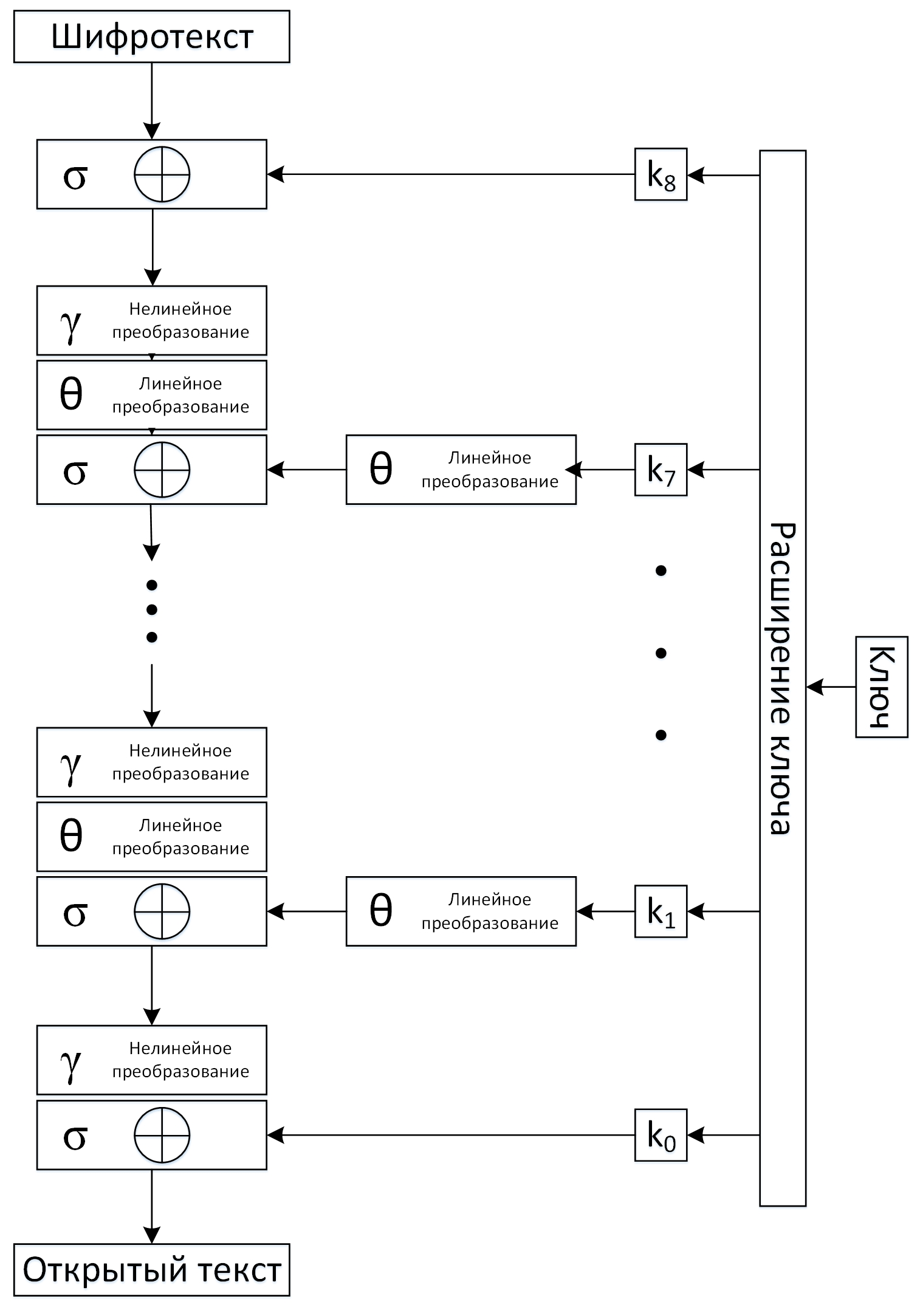 Структура алгоритма расшифрования